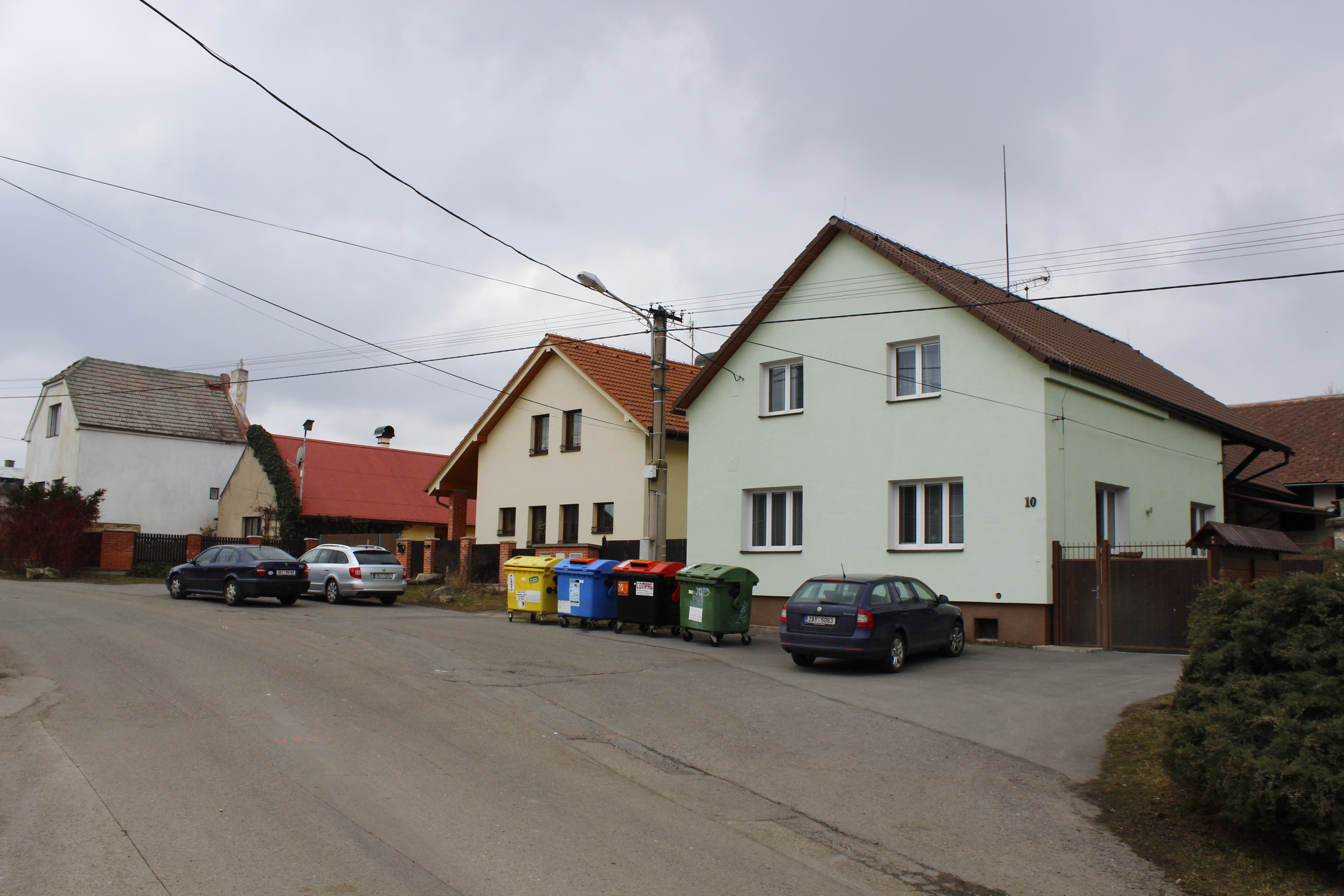 Domy číslo popisné 10 (zelenkavý vpředu), za ním číslo popisné 96 a za ním číslo popisné 11 v Chrástu, součásti Mladé Boleslavi.